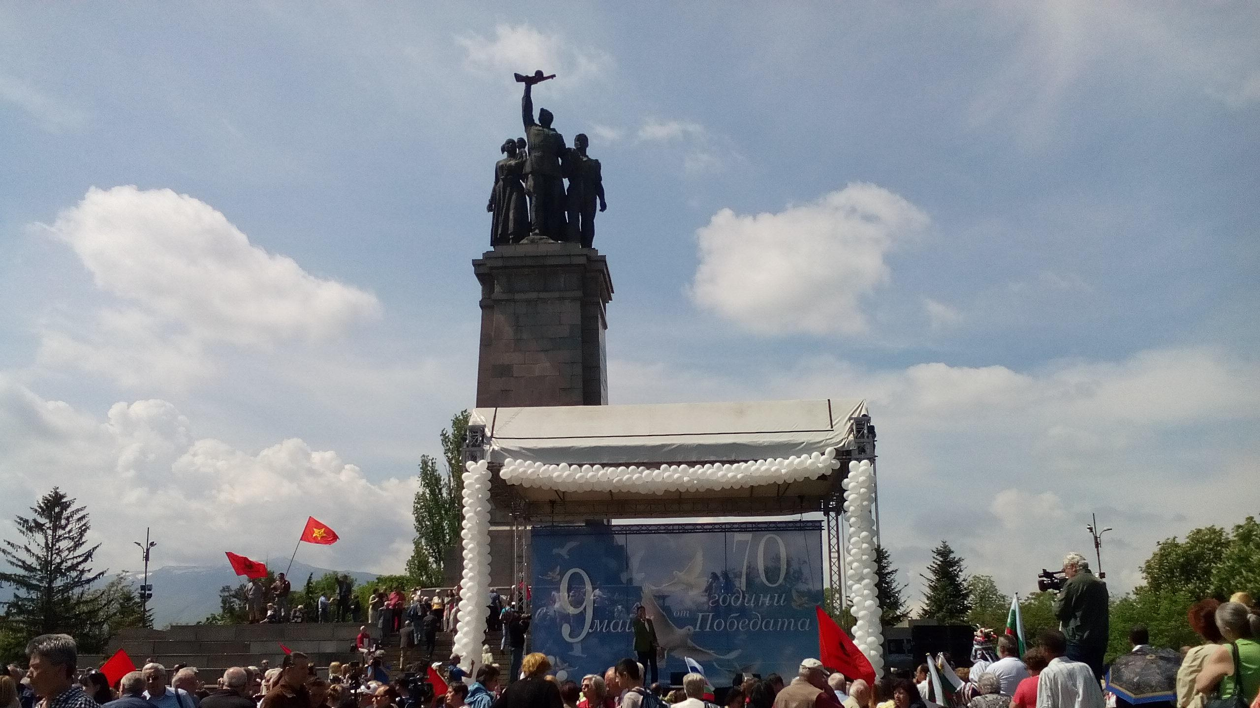 Веселин Маринов на концерта по случай Деня на победата над фашизма пред Паметника на съветската армия в България.